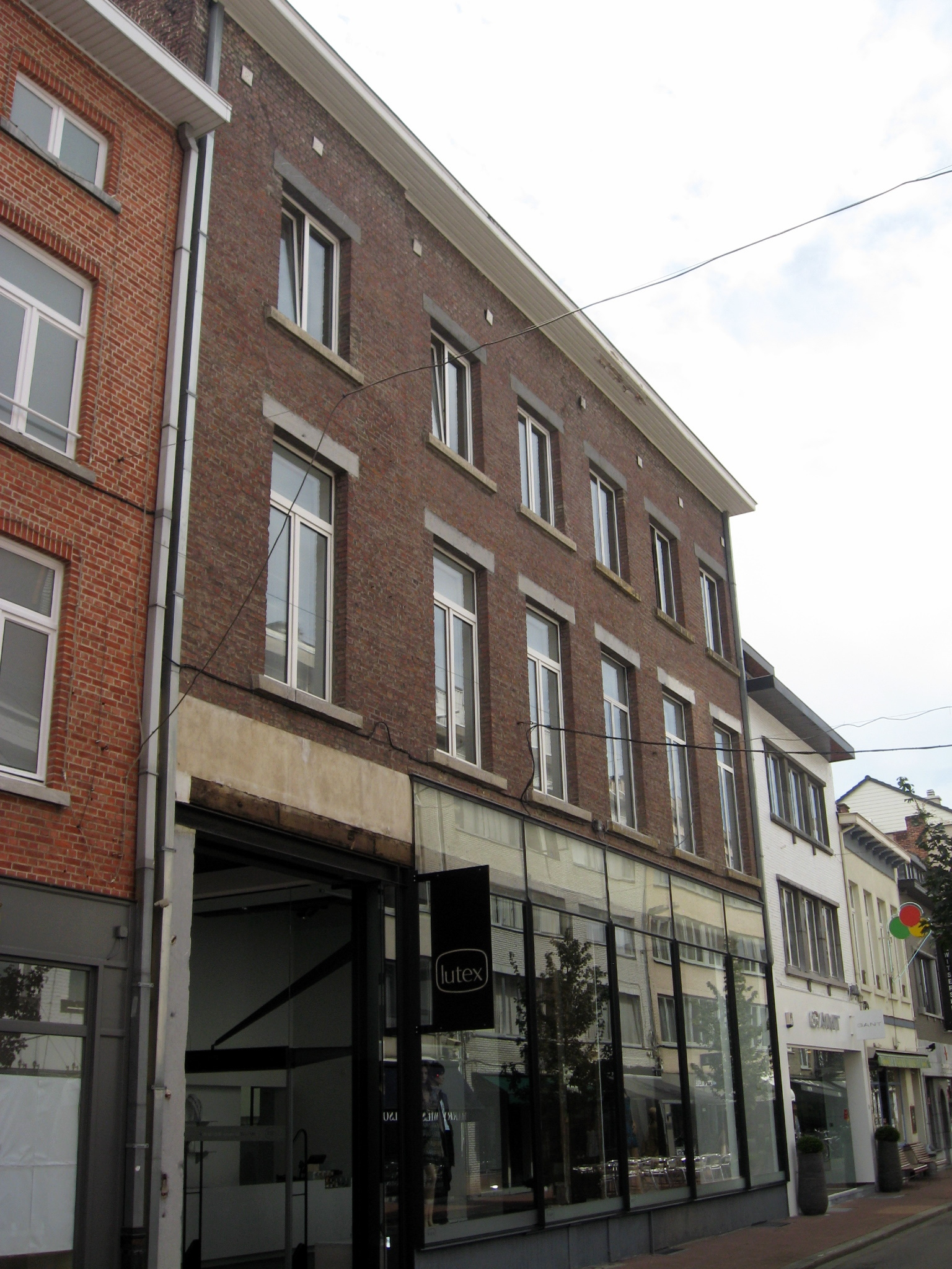 Neoclassicistische woning Aldestraat 10-12 in Hasselt